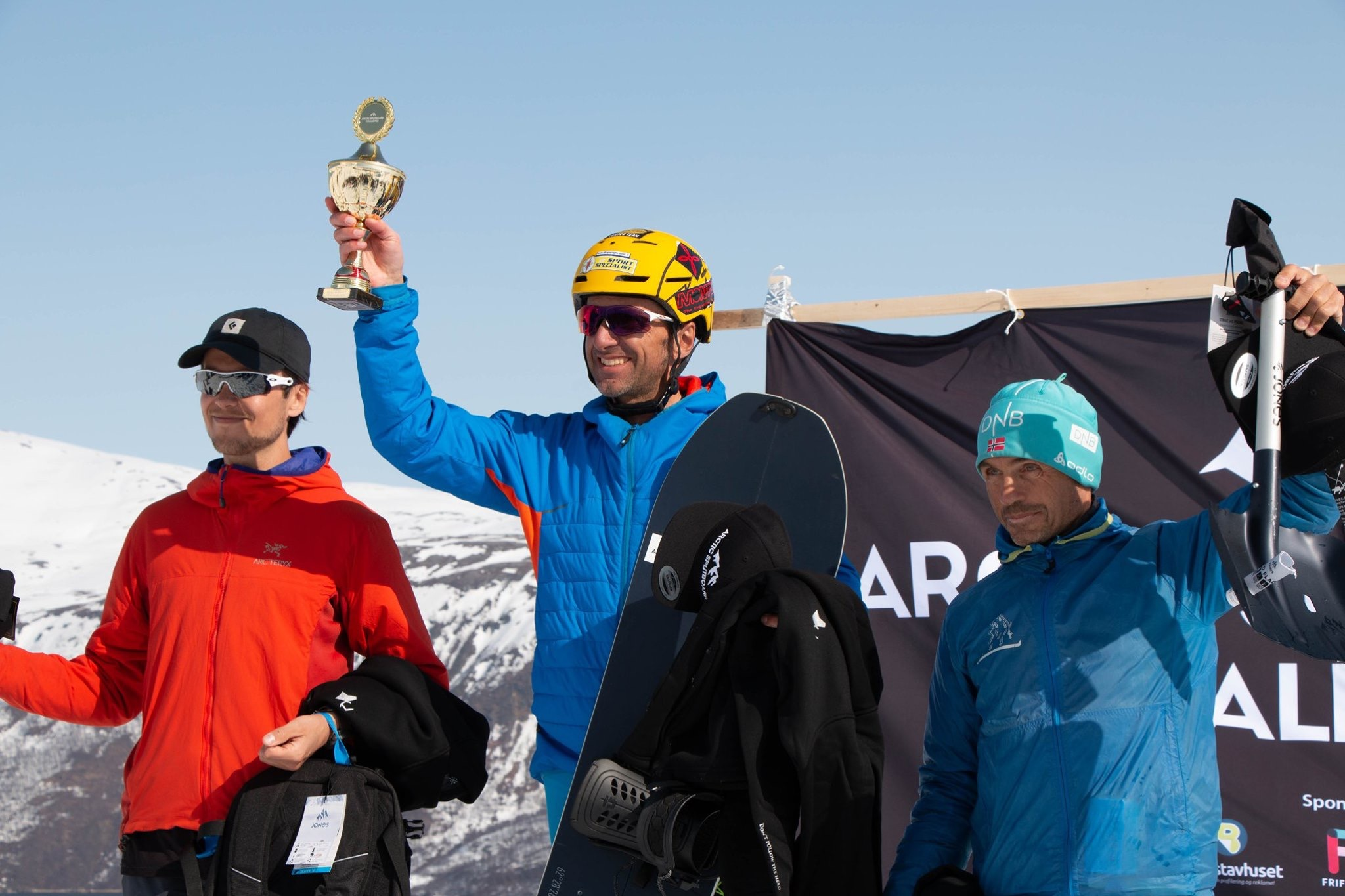 Podio dell'Artic Splitboard Challenge il 27 aprile 2019 a Tromso (Norvegia)